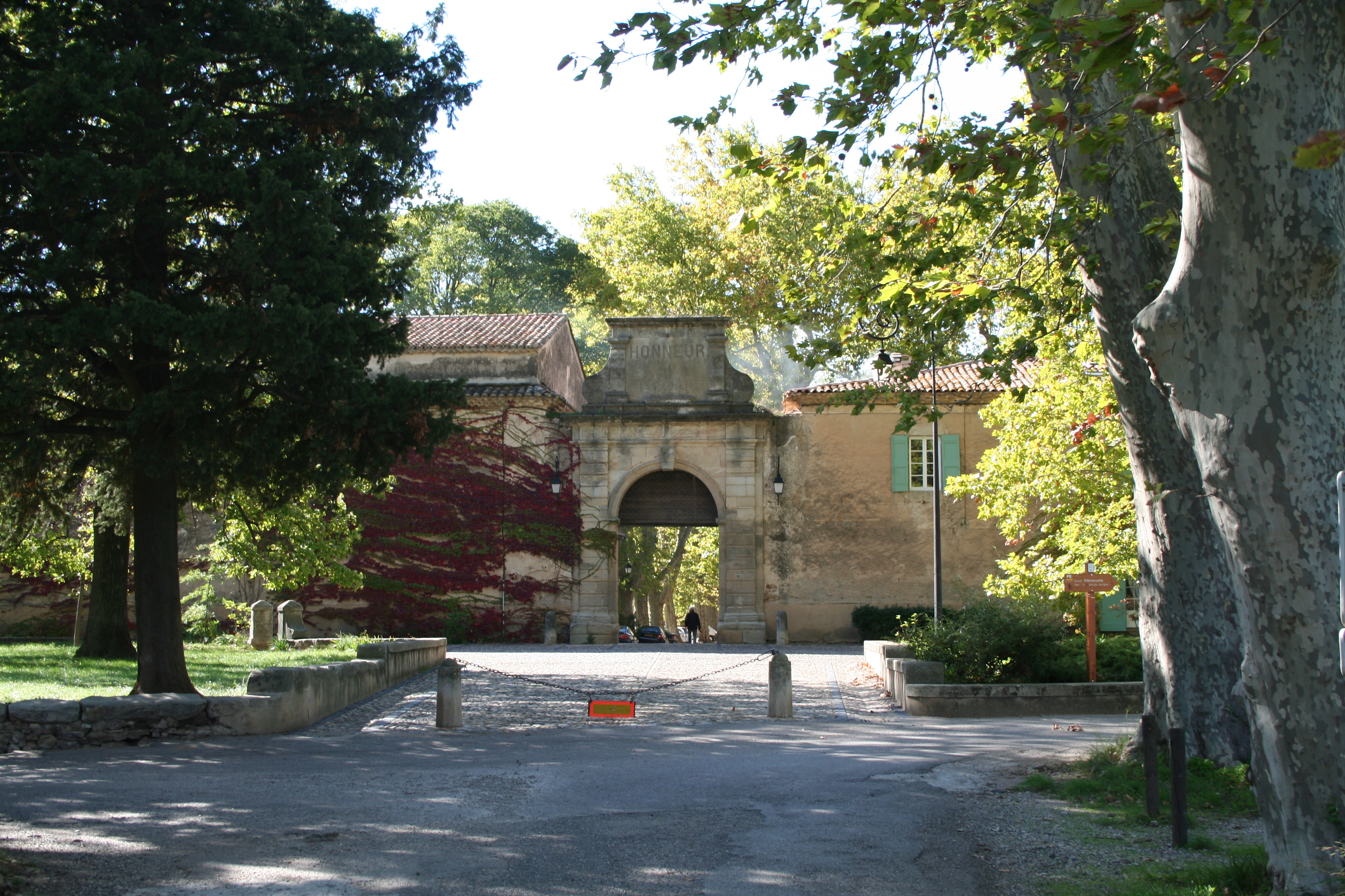 Villeneuvette (Hérault) - entrée.